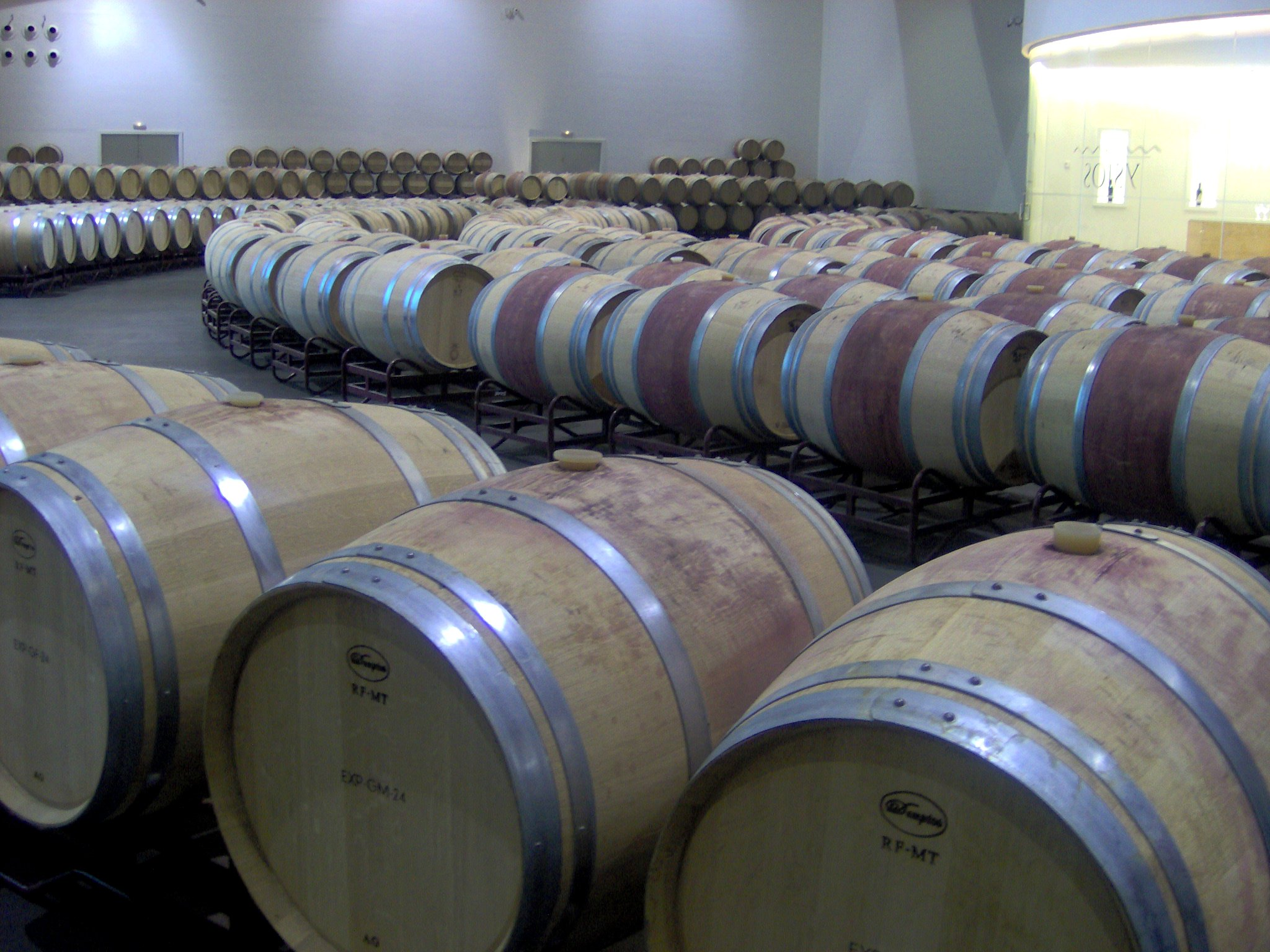 LSI B-105 La Rioja 2007